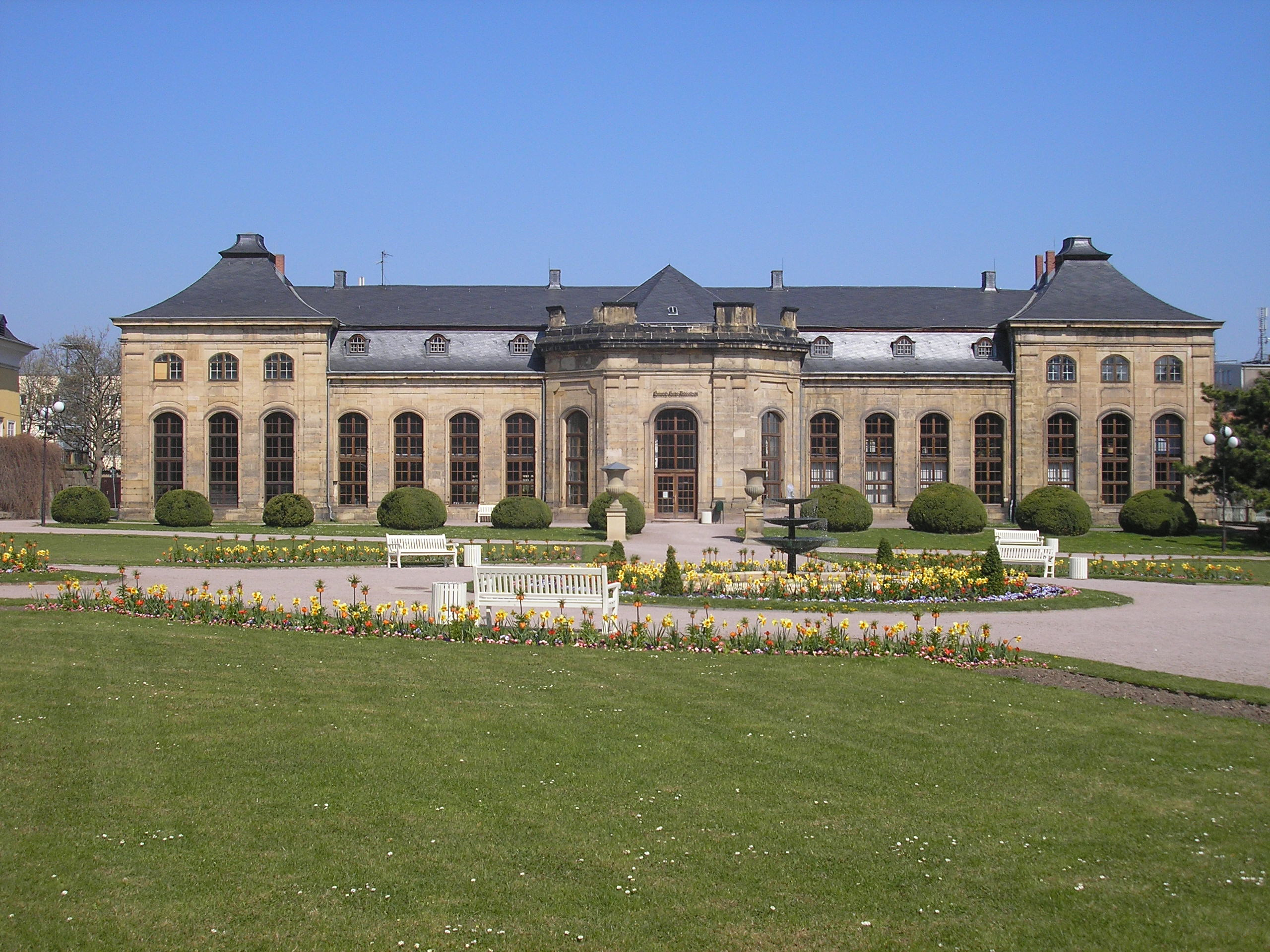 Die Orangerie in Gotha (Thüringen).